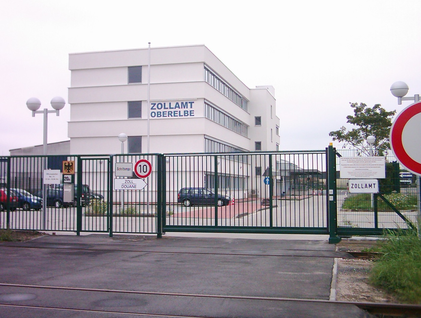 Zollamt Oberelbe, Hamburg-Billbrook.